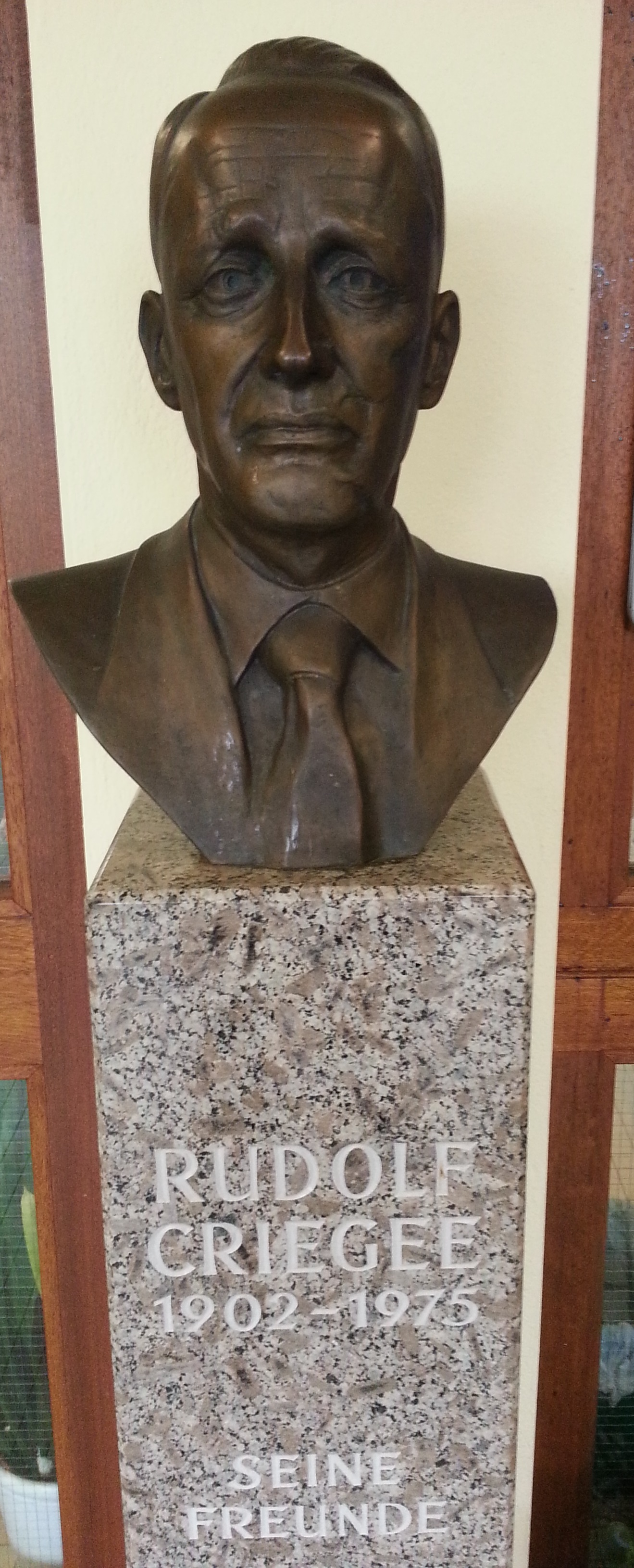 Büste von Rudolf Criegee aus dem Institut für organische Chemie des KIT